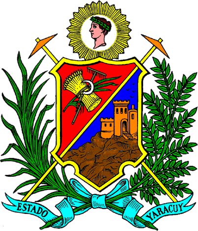 Escudo del Estado Yaracuy, Venezuela.